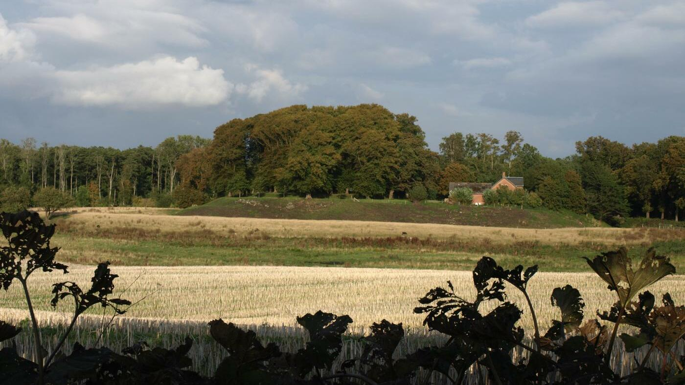 Dänemark, Fünen, Gut Hagenskov, Burghügel, Foto 2014